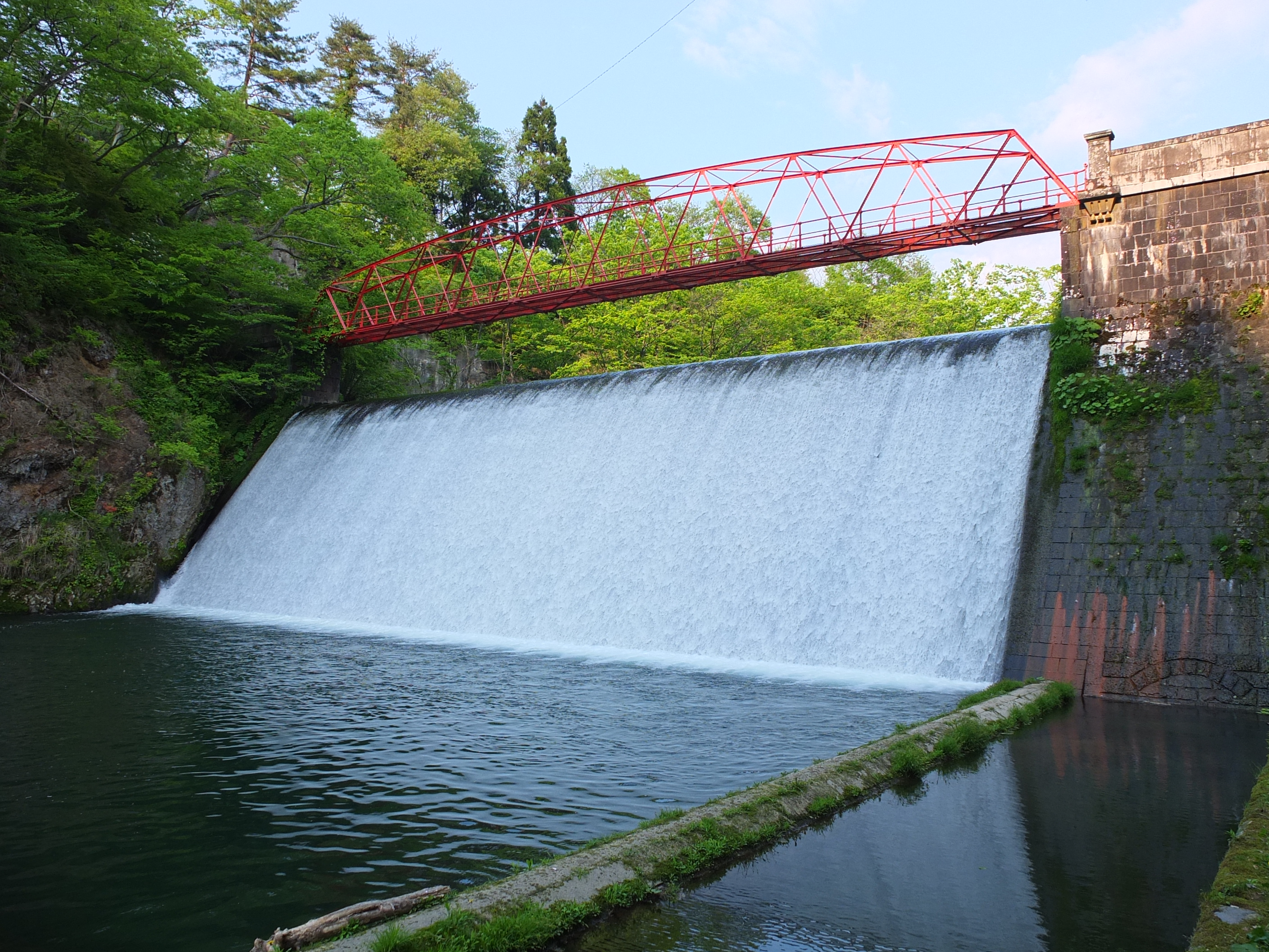 Fujikura Dam (藤倉ダム)